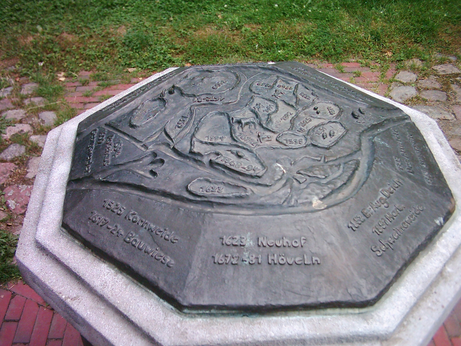 Orte und Datum der Eindeichung im Bereich Wilhelmsburg. Gedenkstätte zur Eindeichung Hamburg-Wilhelmsburgs.